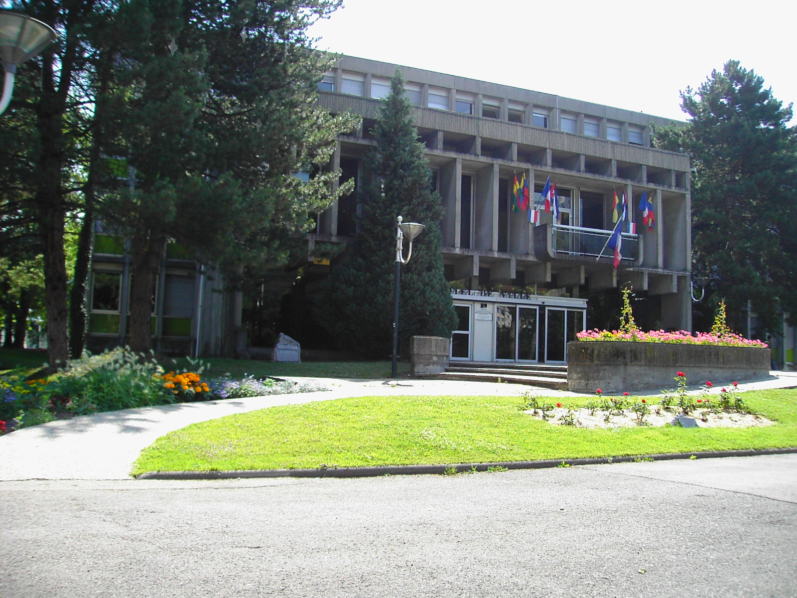 Hôtel de ville. Fontaine, Isère, France